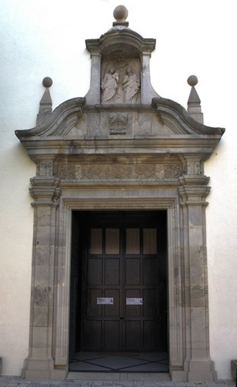 Portal de: Església de Sant Genís a l'Ametlla del Vallès (Vallès Oriental-Catalunya), 1679.